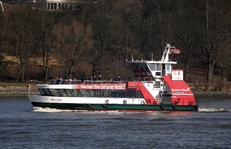 die Fähre "Övelgönne" Bj 2006 in Hamburg